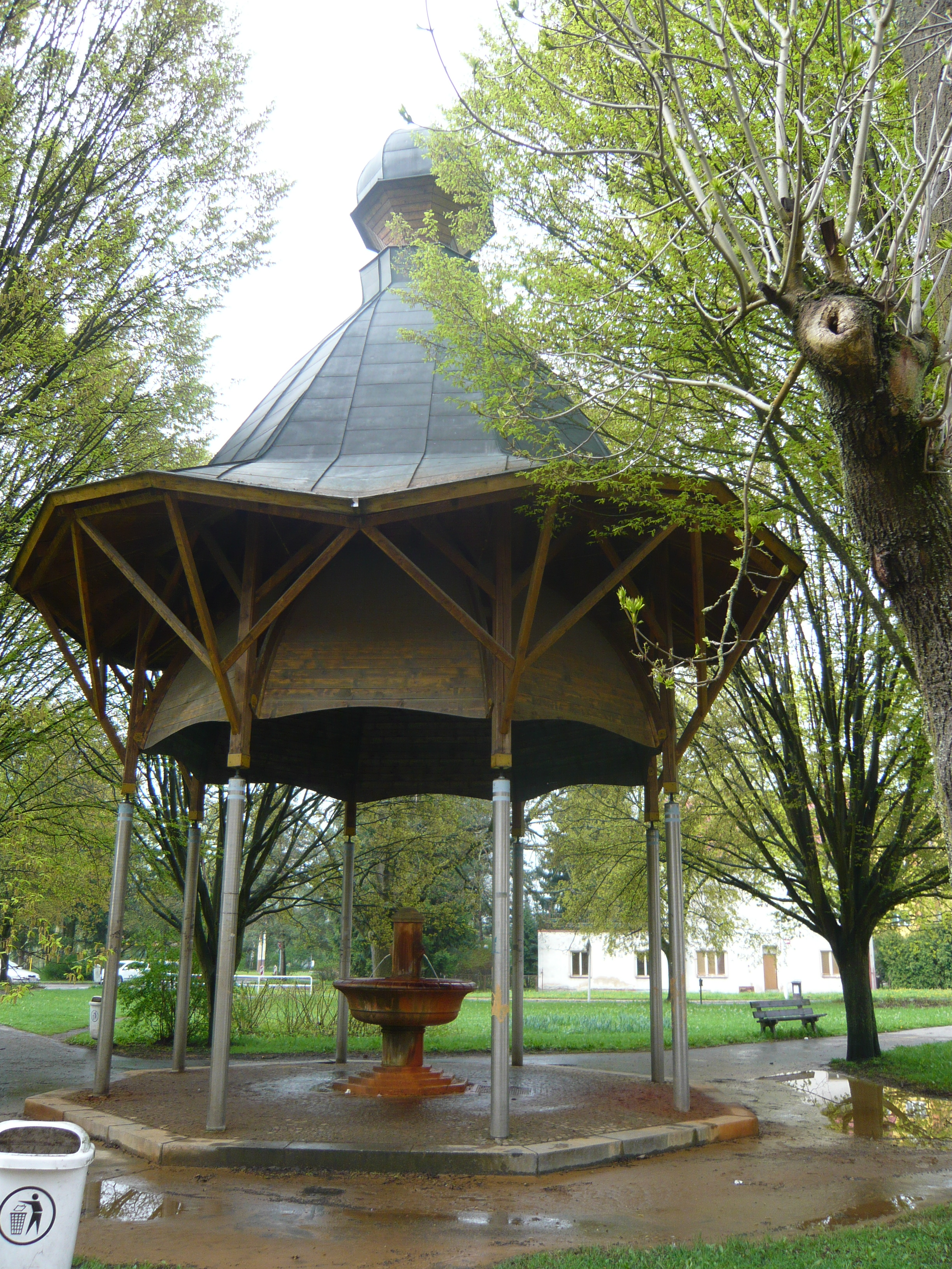 Antonínův pramen, Mariánské Lázně